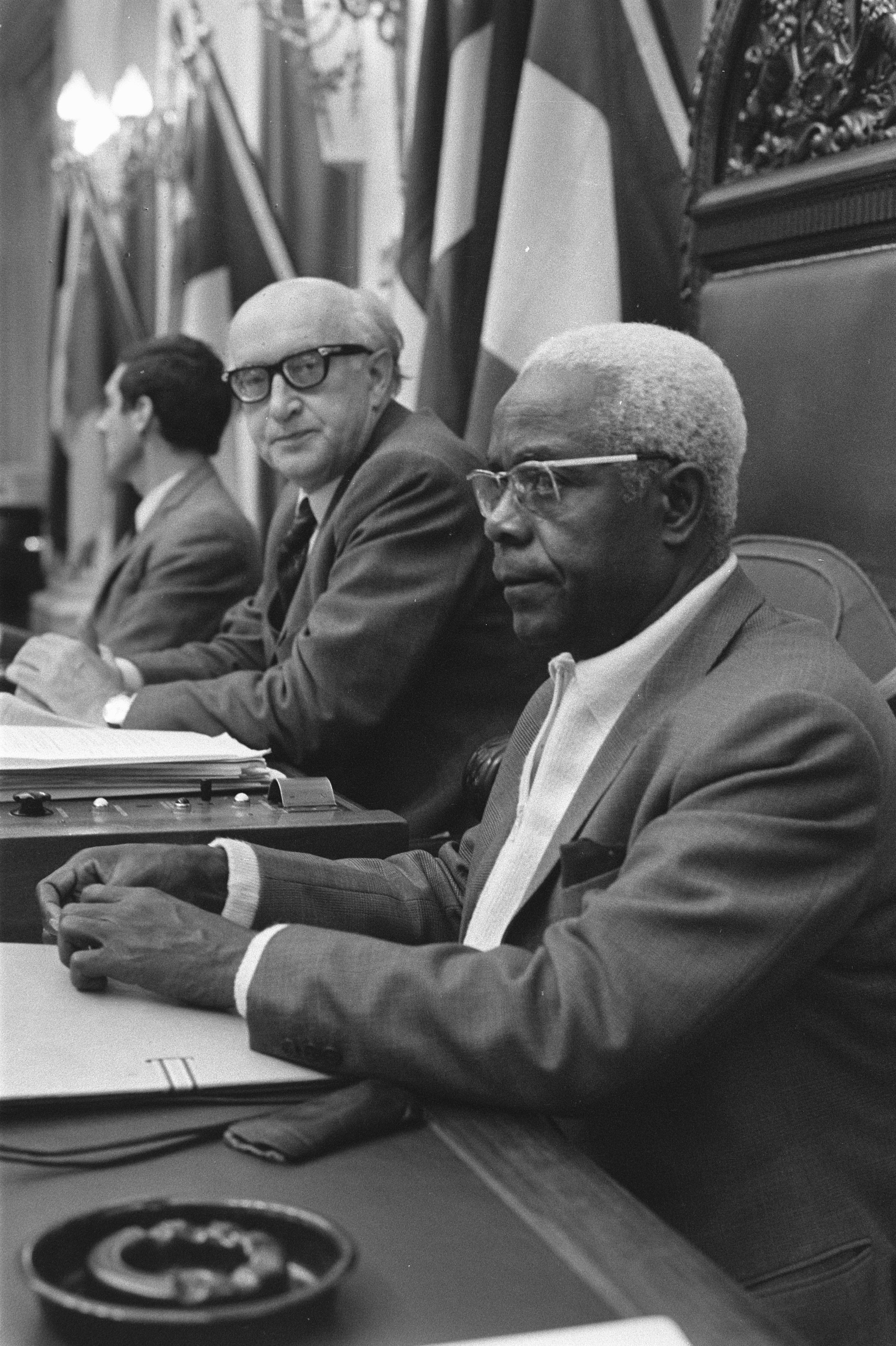 Voorvergadering congres over associaties EEG met Afrikaanse landen in Tweede Kamer Den Haag , (l) Ernst Achenbach, (r) NgoO Mebe (Kameroen). Den Haag (Nederland), 10 januari 1972